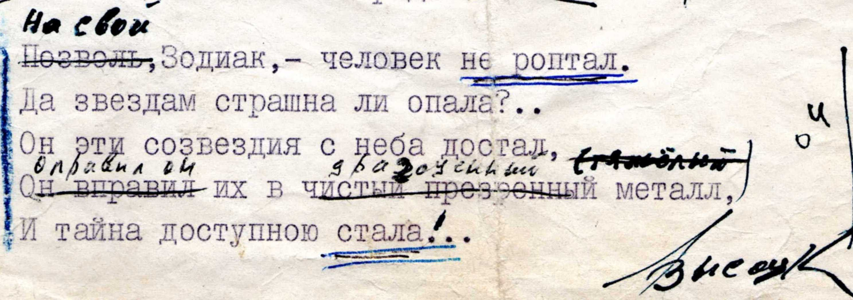 Автограф Владимира Высоцкого под его песней "Знаки зодиака", 1974 год